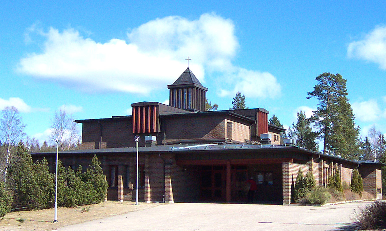 Grängesbergs kyrka, Dalarna